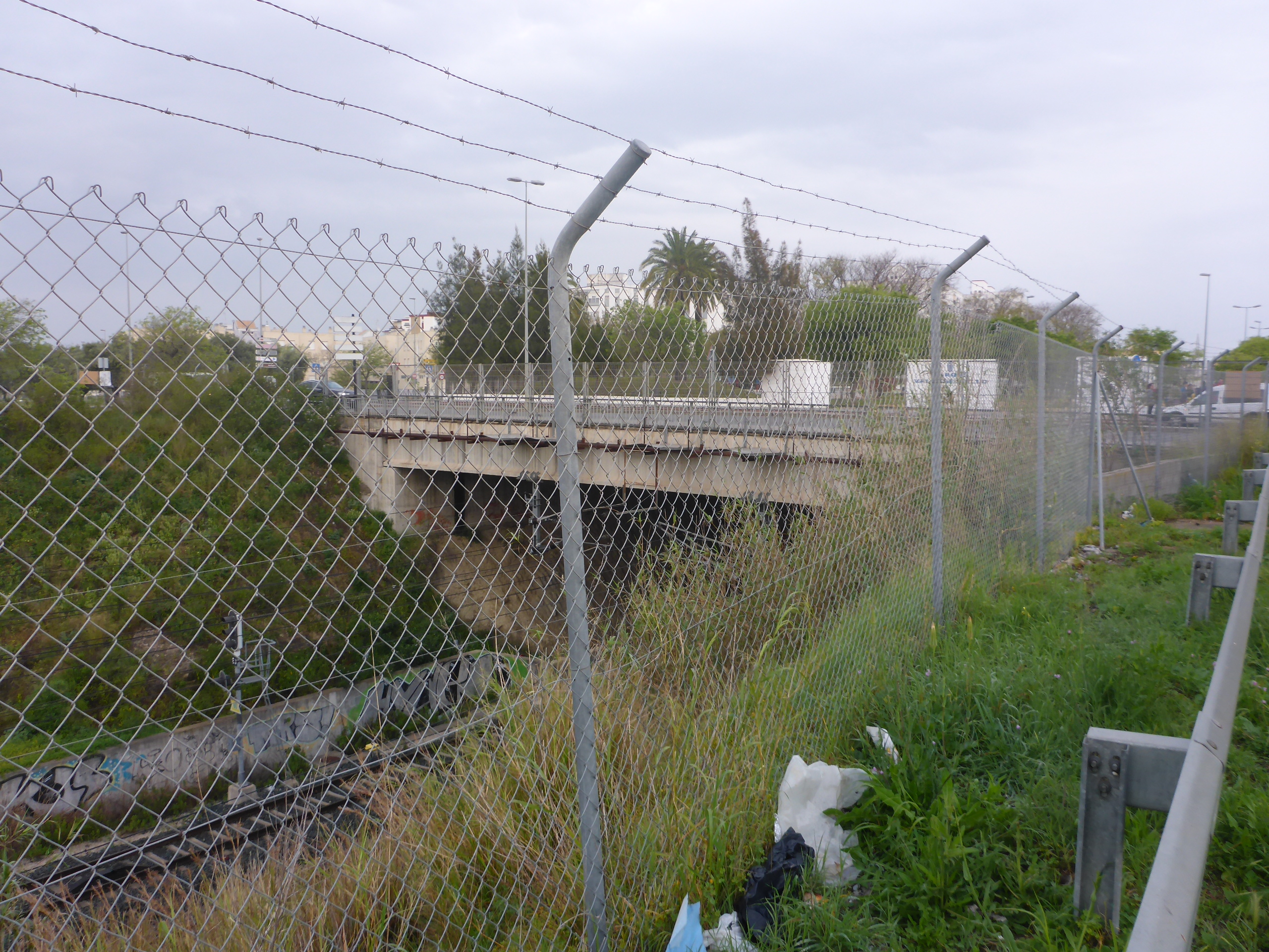 Puente de Cádiz en Jerez de la Frontera (Andalucía, España)